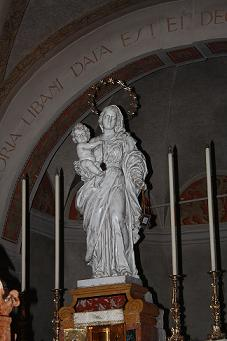 Statua posta sull'altare maggiore